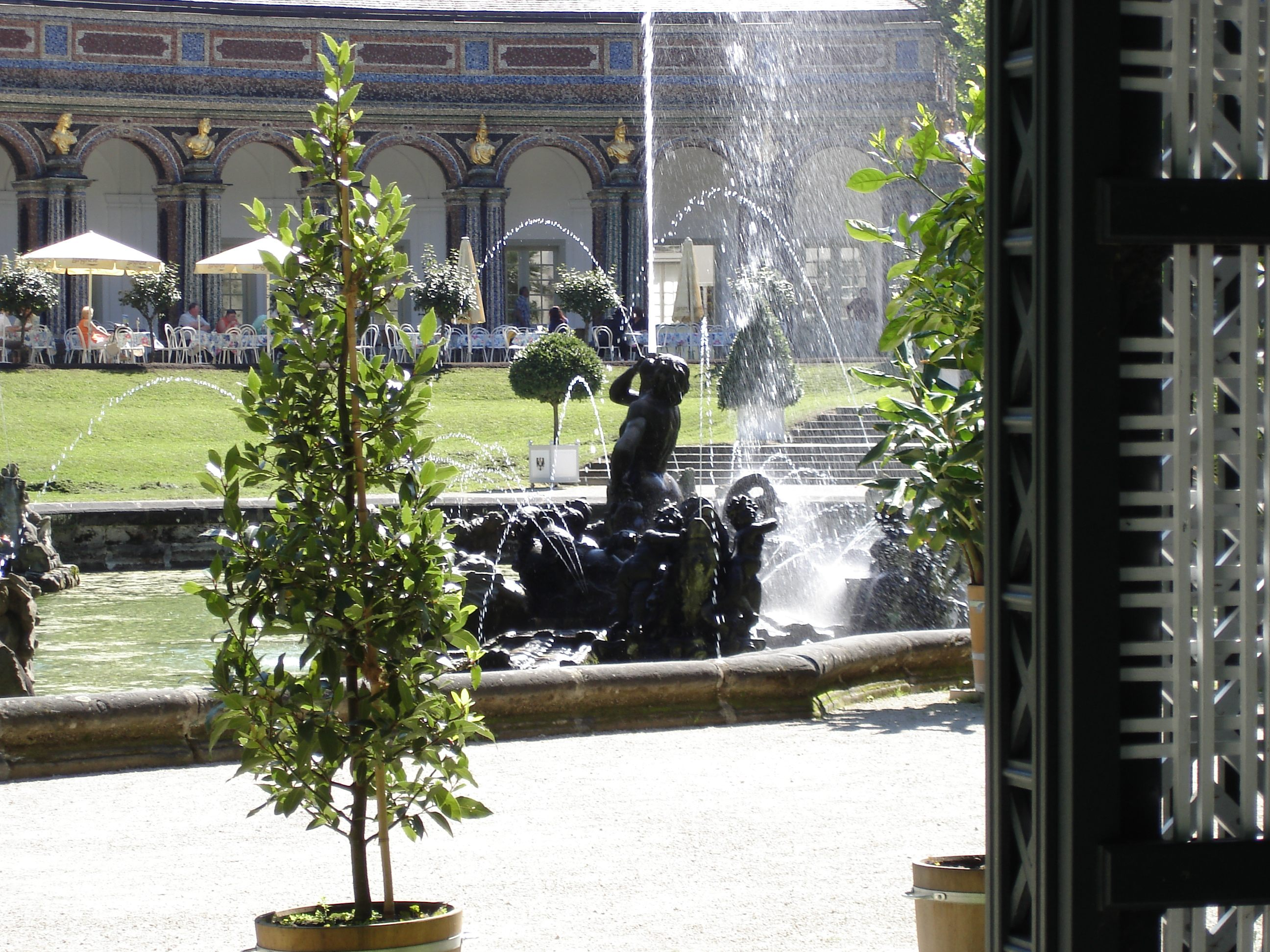 Eremitage (Bayreuth), Wasserspiele vor dem Neuen Schloß der Eremitage, Obere Grotte